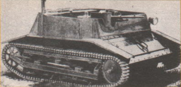 Pierwszy prototyp małego czołgu rozpoznawczego polskiej konstrukcji TK-1 (zwany też Tek 1001, TK wz. 30 lub lekki czołg szybkobieżny wz. 30). Prawdopodobnie nosił on numer rejestracyjny 6005 TK. Zawieszenie zmodernizowane, lecz silnik i skrzynia przekładniowa zapożyczone jeszcze z modelu Carden-Loyd. [opis oryginalny]. Uwaga: Prawdopodobnie jest to jednak TK-2 (bo on miał taki silnik i koła napędowe z przodu). Magnuski się chyba pomylił przy opisie [Za A. Jońca: Tankietki TK-3 i TKS; wyd. 2013].